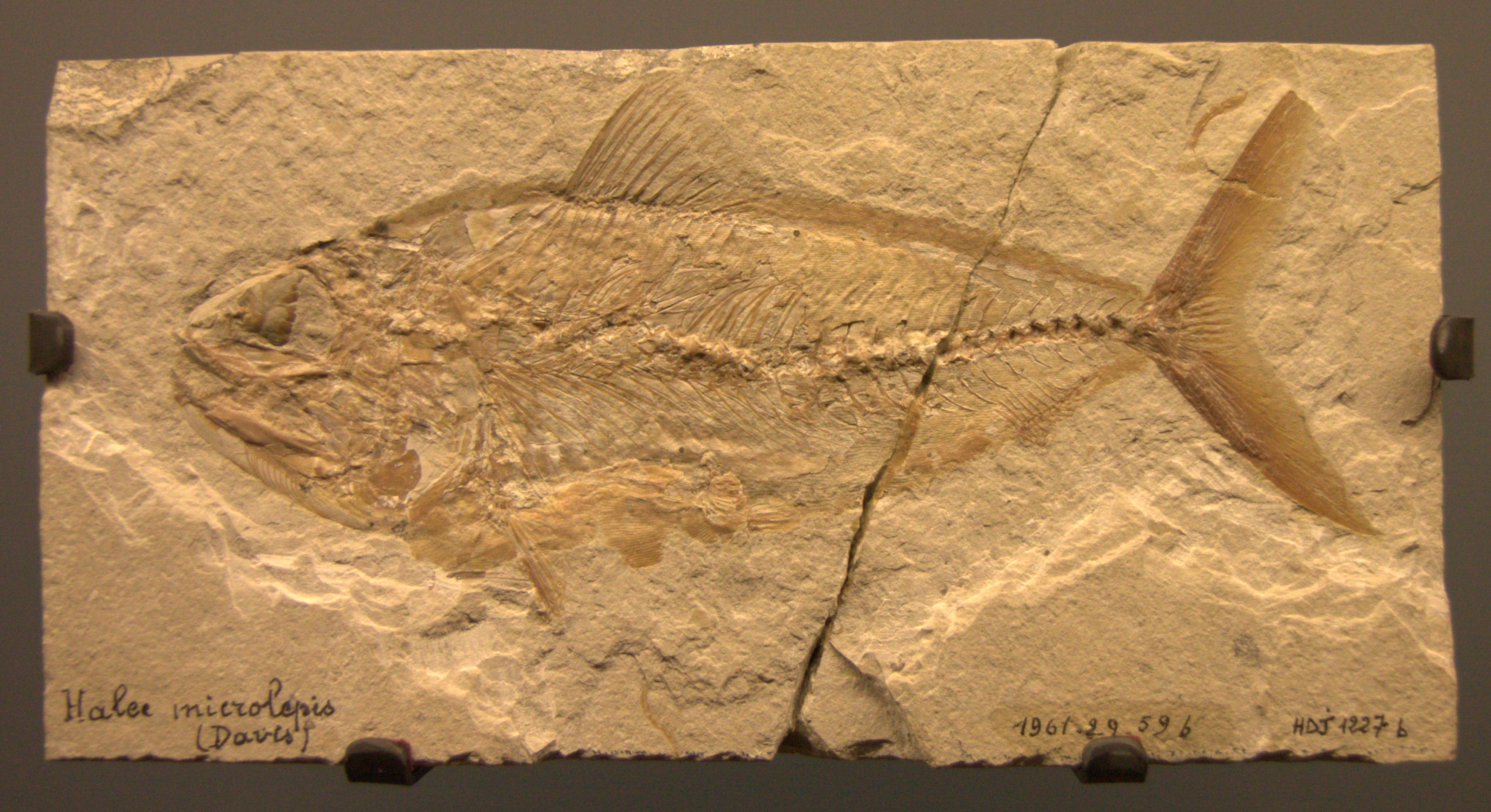 Daté d'environ 95 millions d'années, ce specimen est considéré comme proche du poisson-lancier. Il a été découvert à Hadjoula au Liban. The making of this document was supported by Wikimédia France. (Submit your project!)